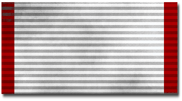 Dannebrogon ritarikunen nauha.